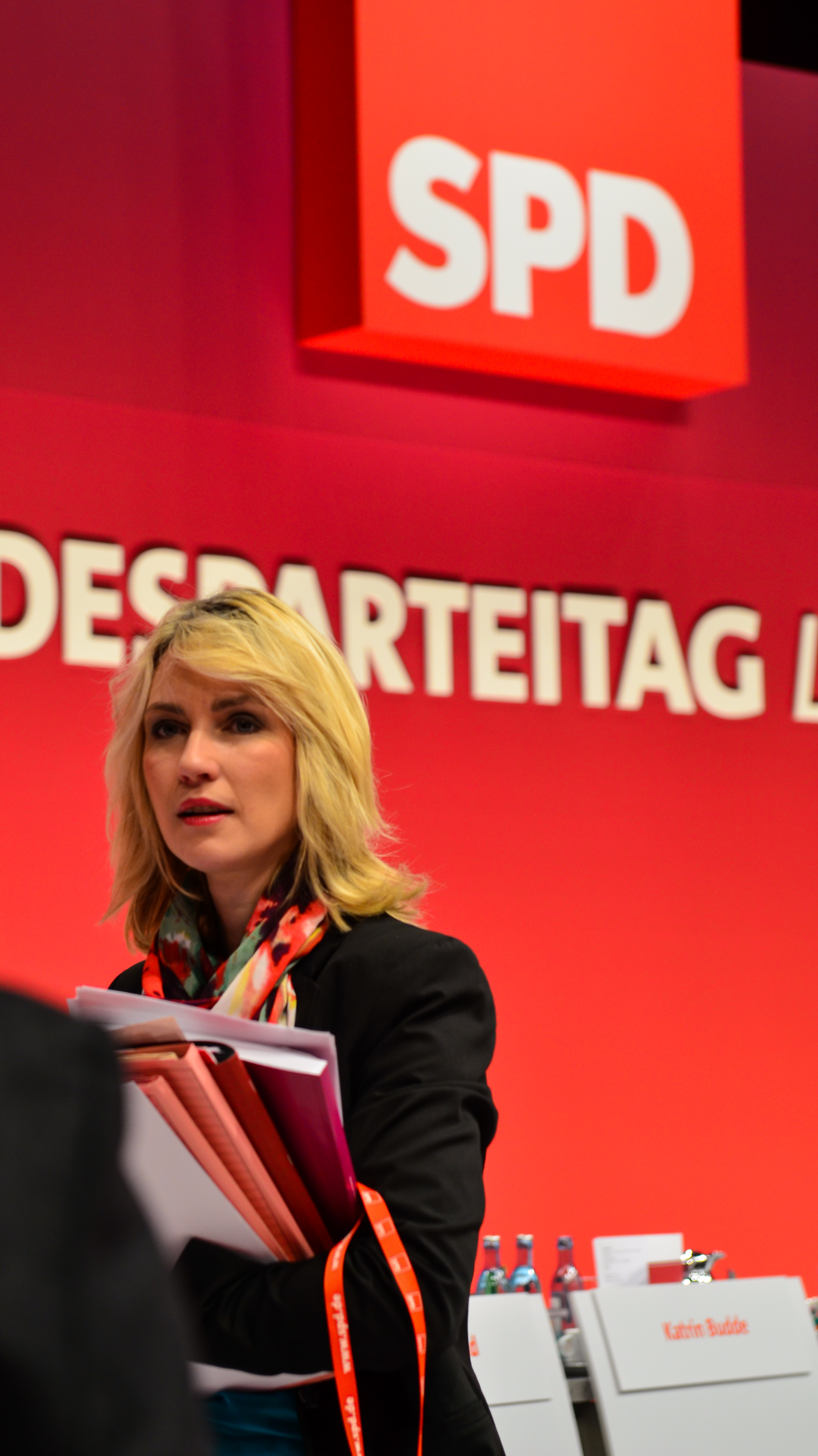 SPD Bundesparteitag 2013 in Leipzig (14.-16. November 2013); Neue Messe